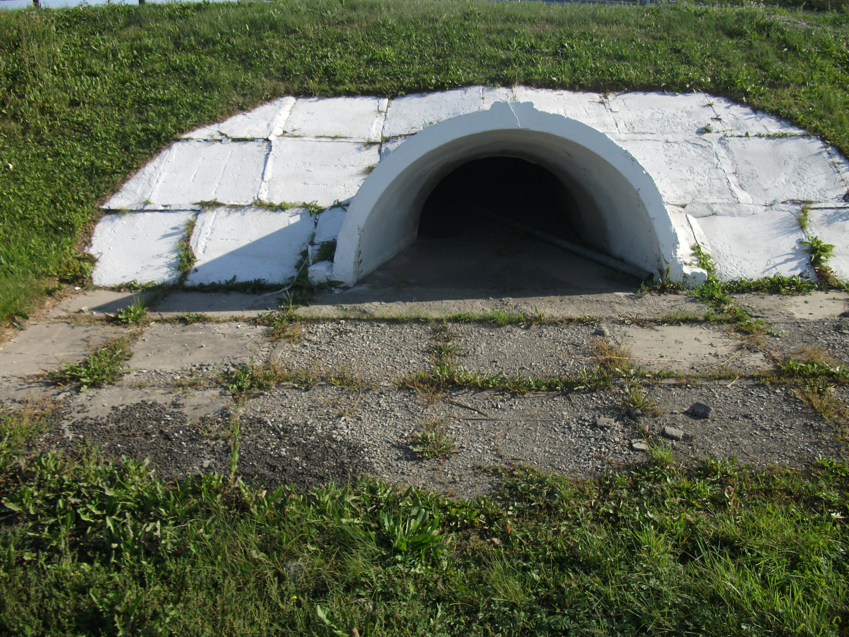 Оголовок железобетонной трубы из полуколец